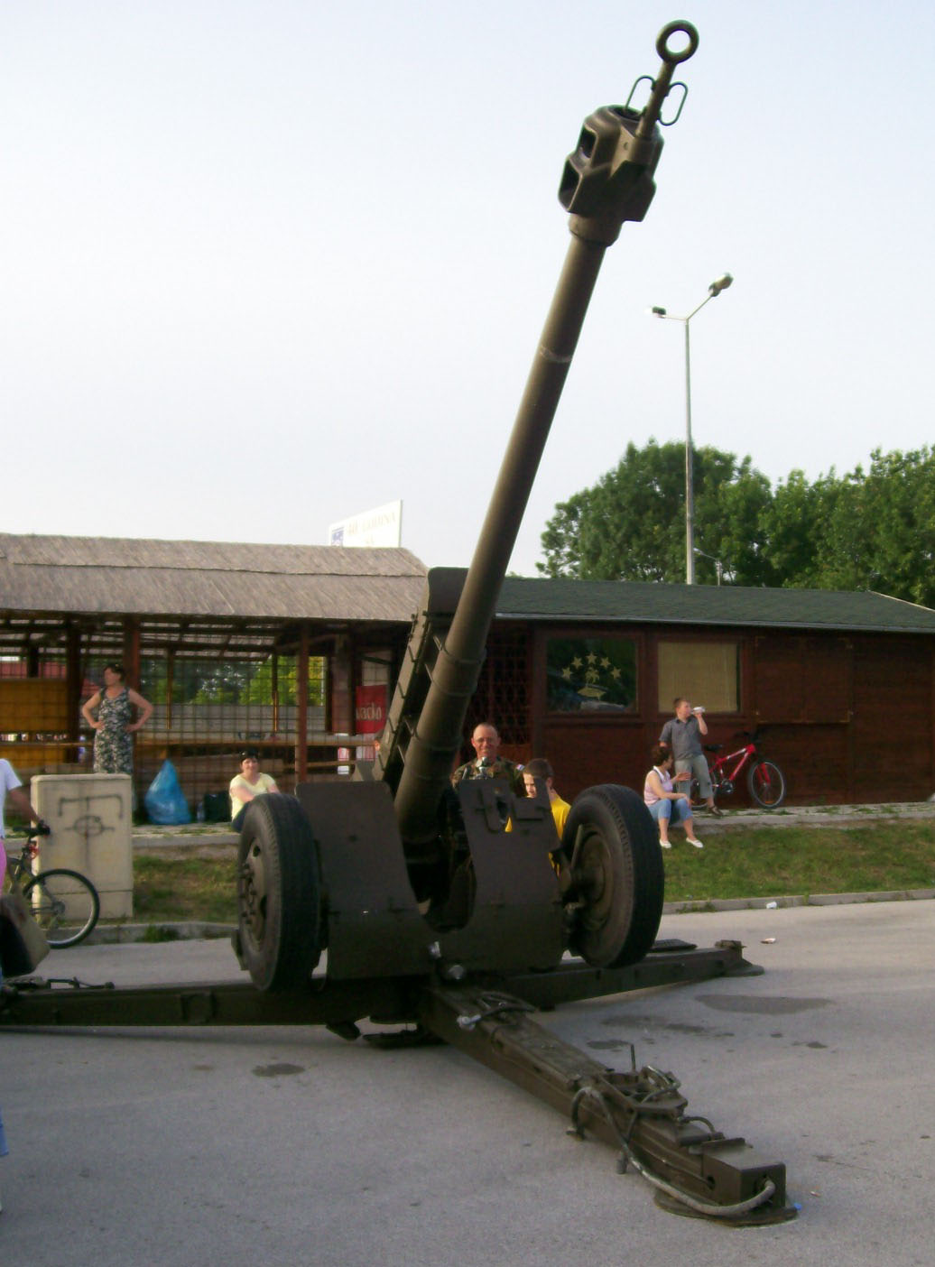 Haubica 122mm D30 M94 HR